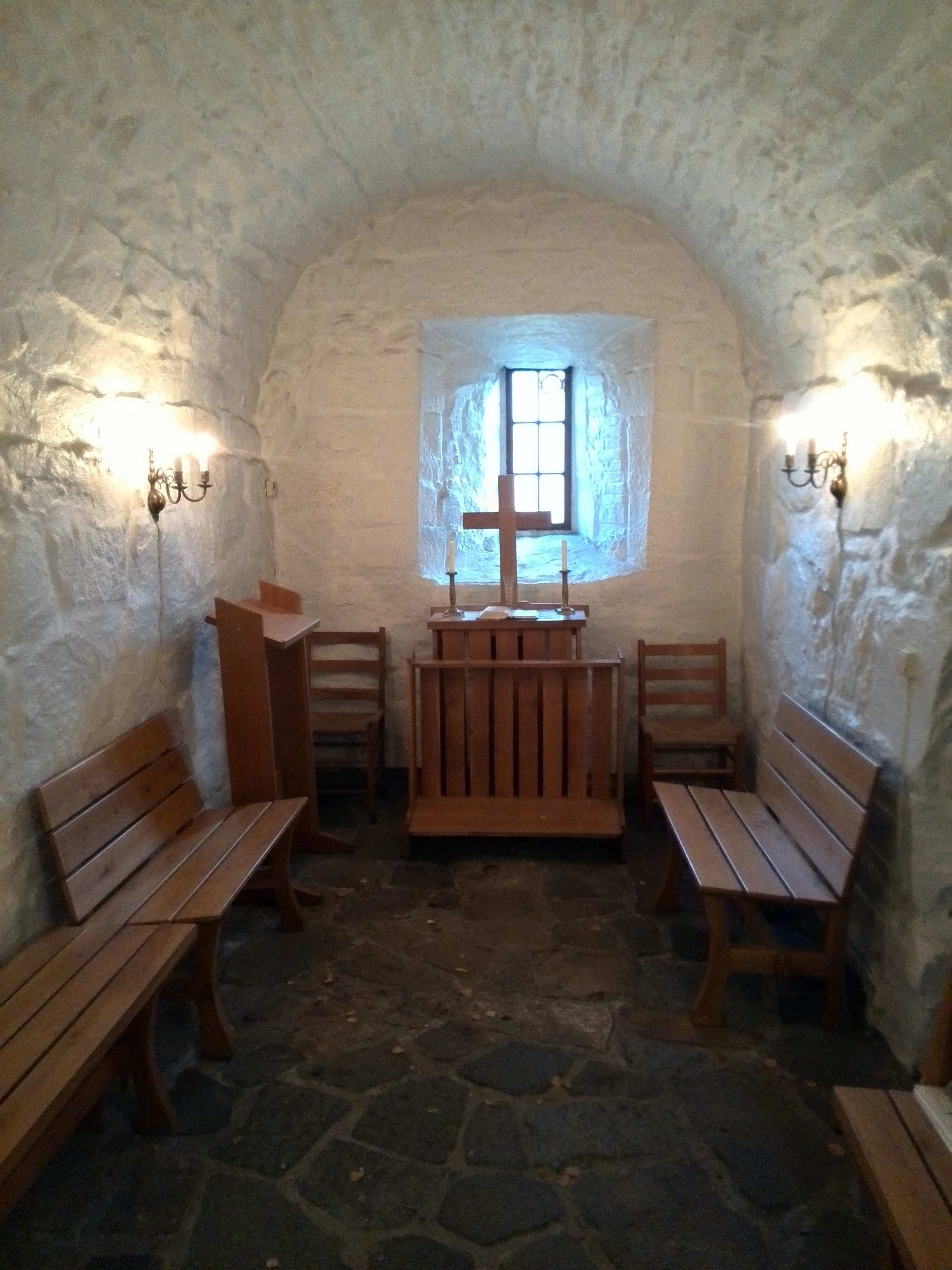 Mariakapellet i ruinene av Olavskirken i Bamble